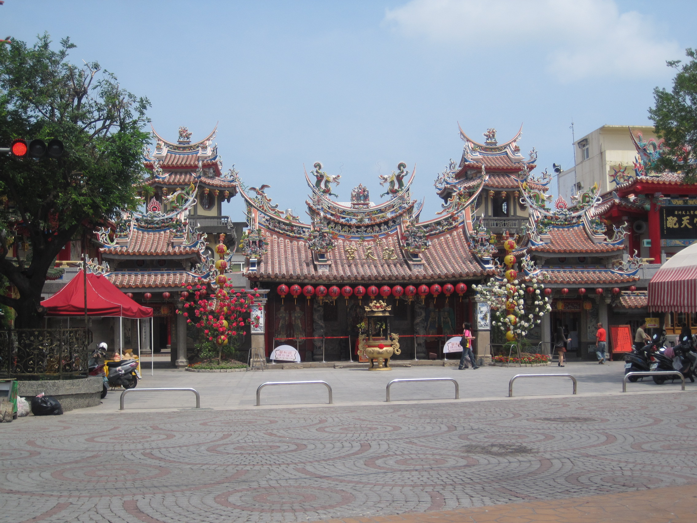 朴子配天宮